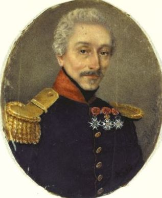 François de Fossa vers 1840